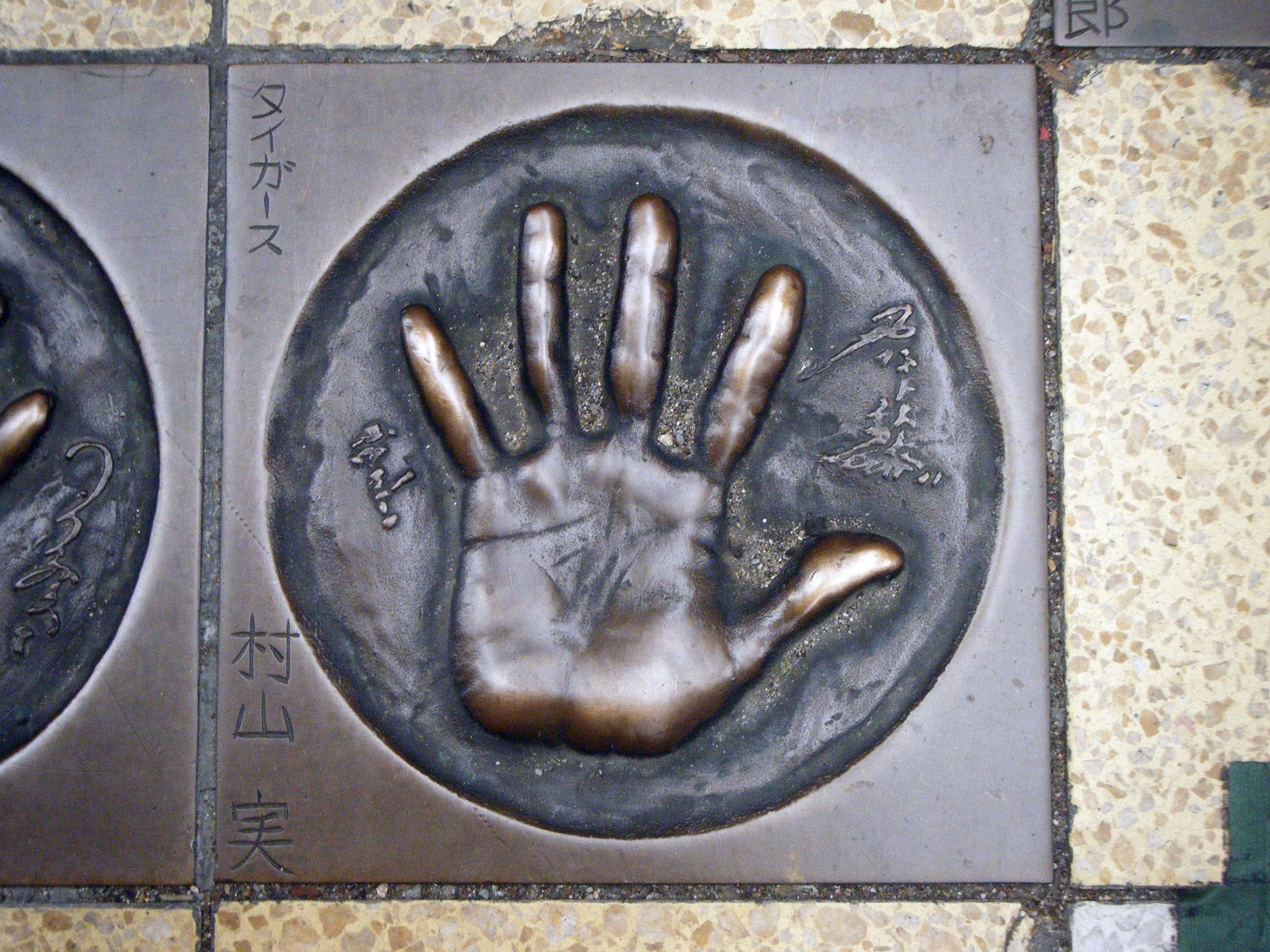 1982年、サンロード（新三和商店街）の改装時に交差点路面へ埋め込まれた、阪神タイガース選手・村山実の手形